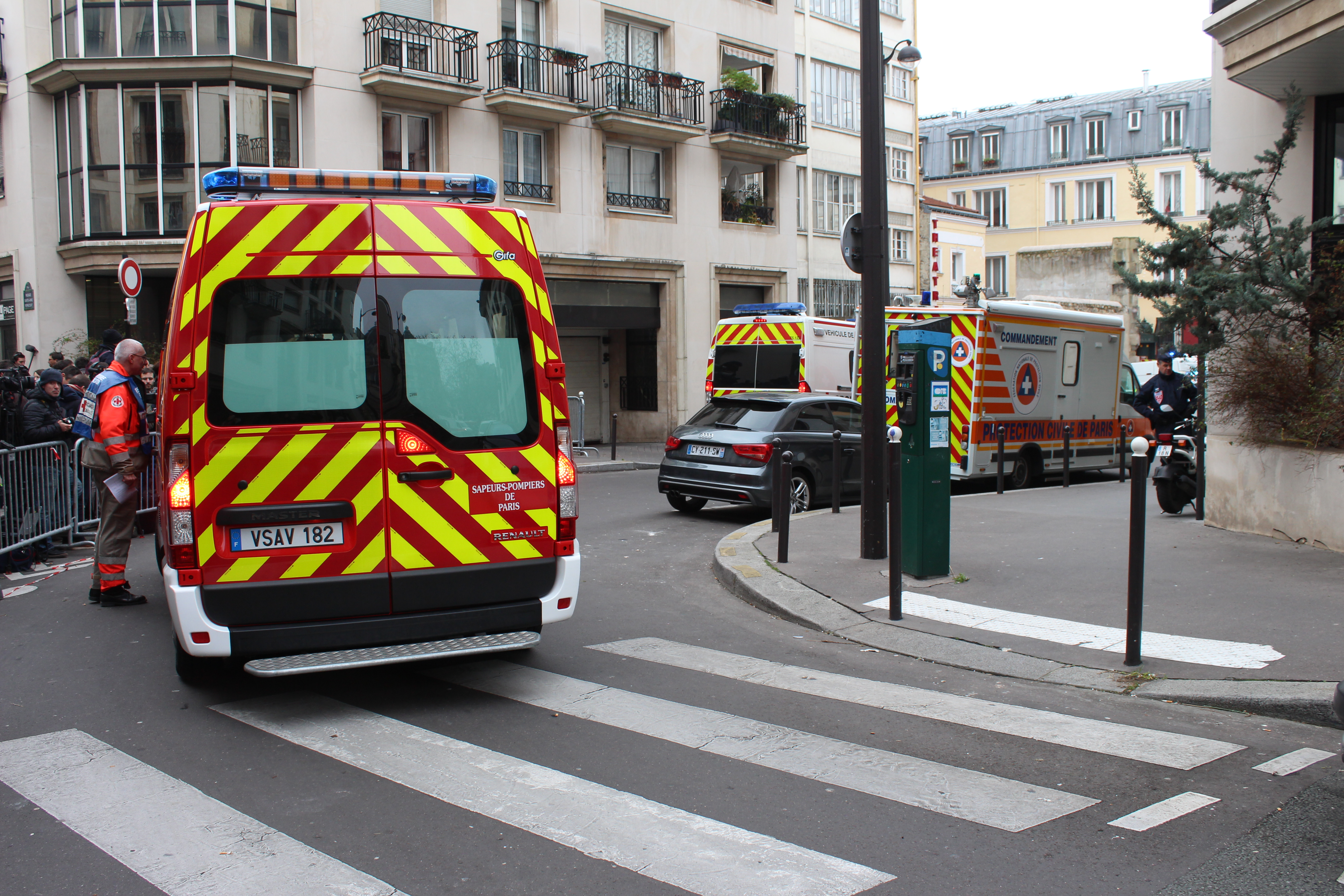 Vue de la zone du 11e arrondissement interdite aux badauds par la police après la fusillade au siège de Charlie Hebdo, prise avec l'aide du journaliste de LCP Jérémie Hartmann.